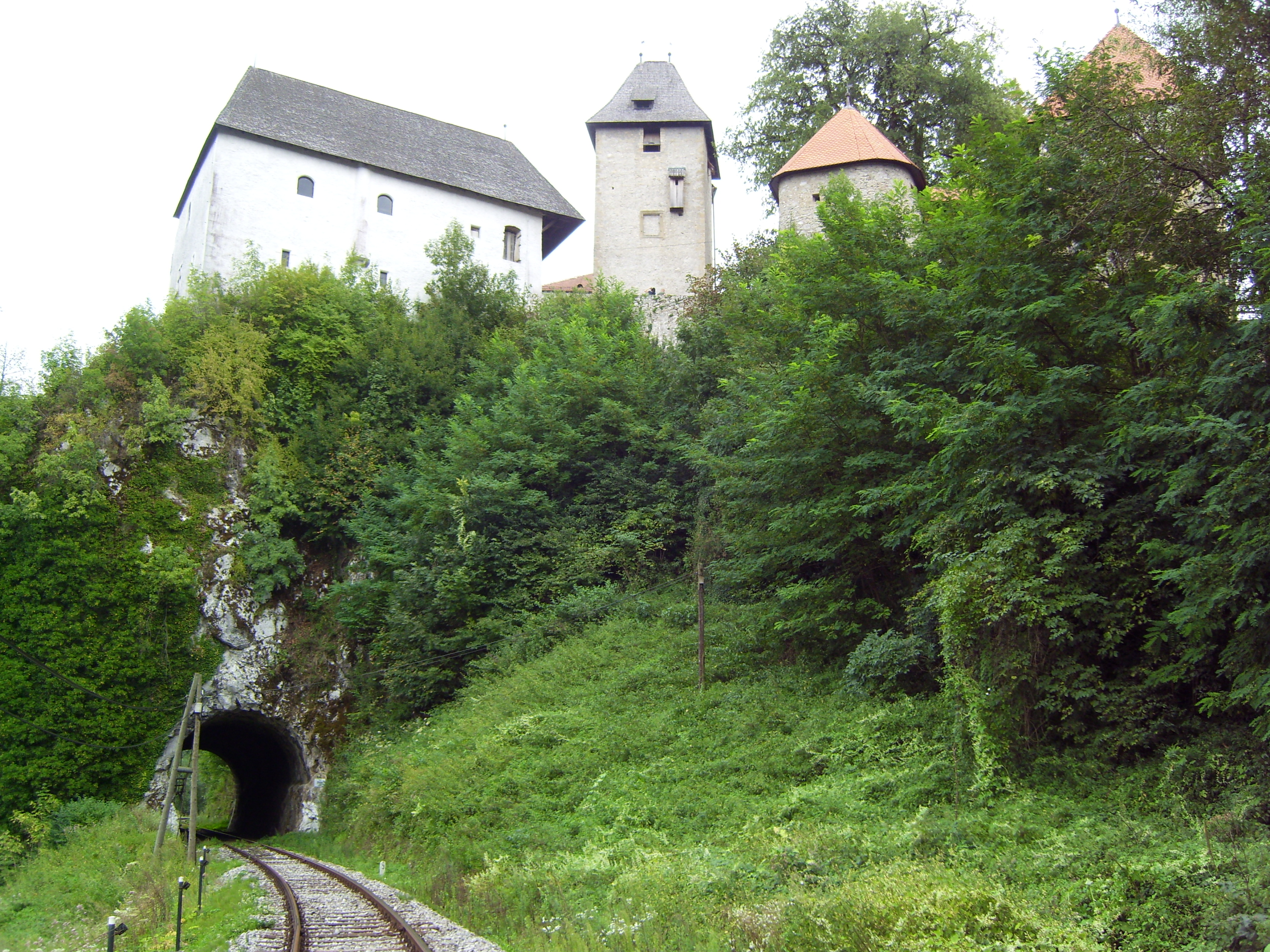 Ansicht der Burg Ozalj( Alte Stadt )